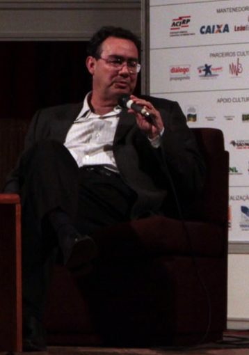 Augusto Jorge Cury (Colina, 2 de outubro de 1958) é um médico, psiquiatra, psicoterapeuta e escritor. Seus livros já venderam mais de 20 milhões de exemplares somente no Brasil, tendo sido publicados em mais de 60 países. Foi considerado pelo jornal Folha de São Paulo o autor brasileiro mais lido da década.